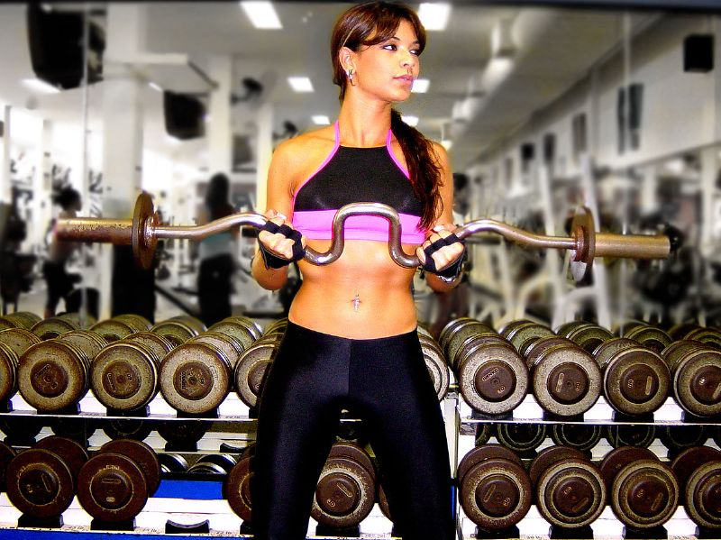 A modelo e apresentadora de TV brasileira Amanda Françozo.